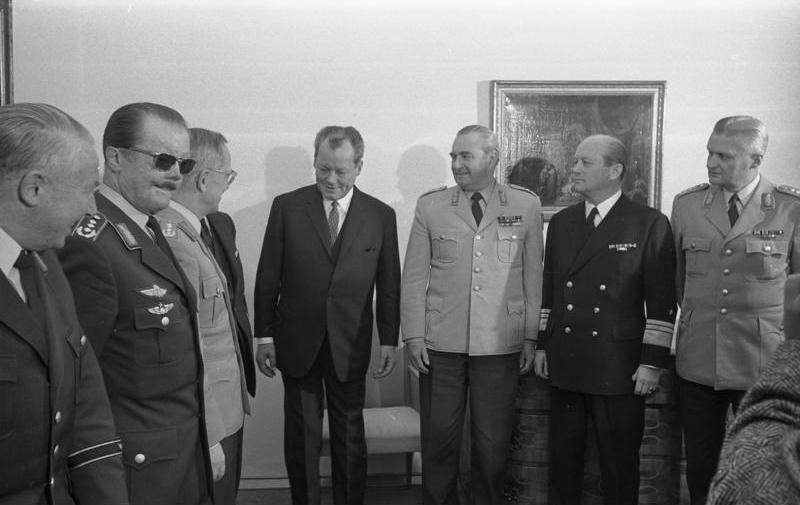 Bundeswehrführung bei Bundeskanzler Brandt in Bonn